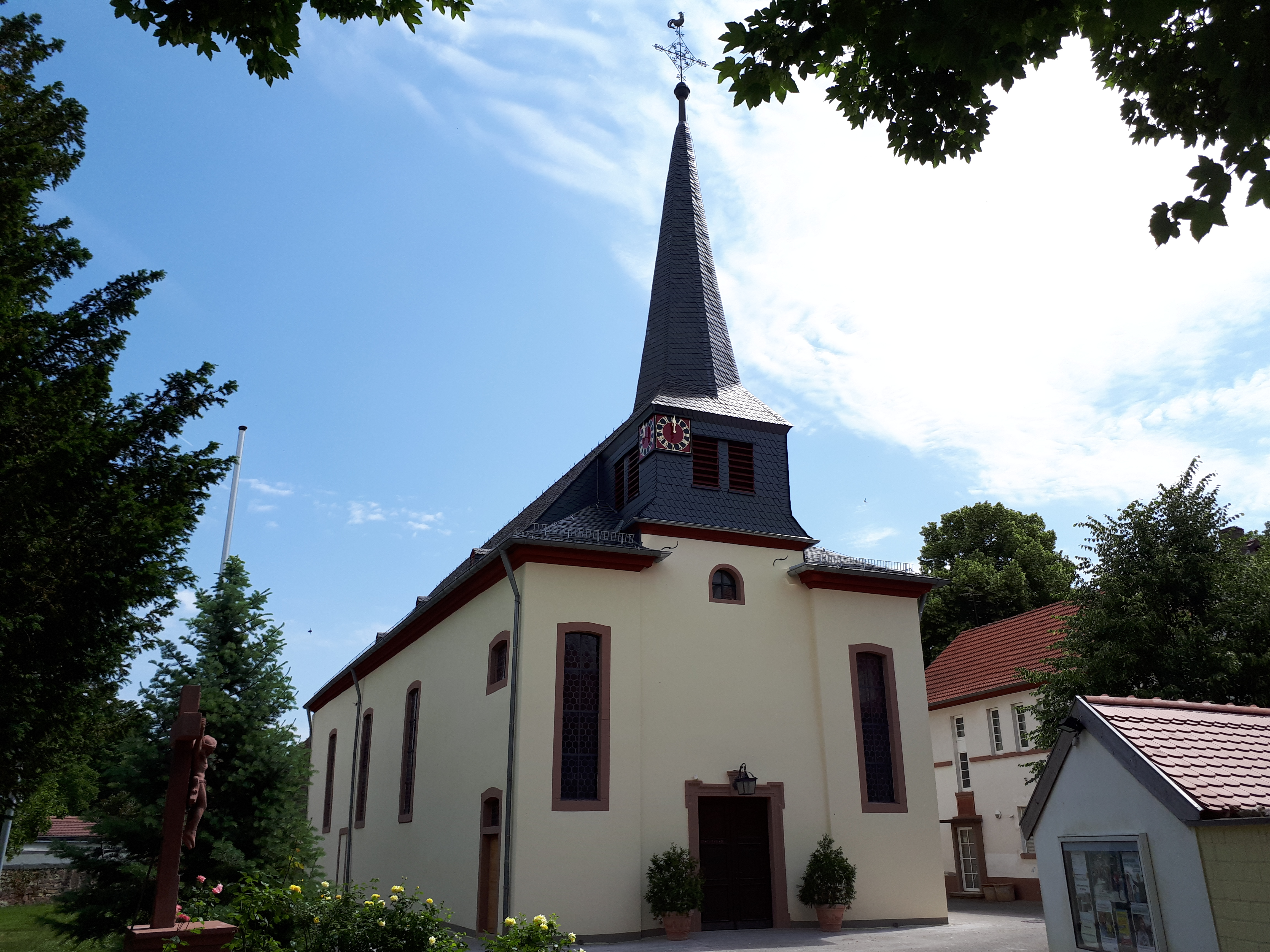 Katholische Pfarrkirche St. Petrus in Ketten, Astheim. Hier: Nach der Außenrenovierung 2018.